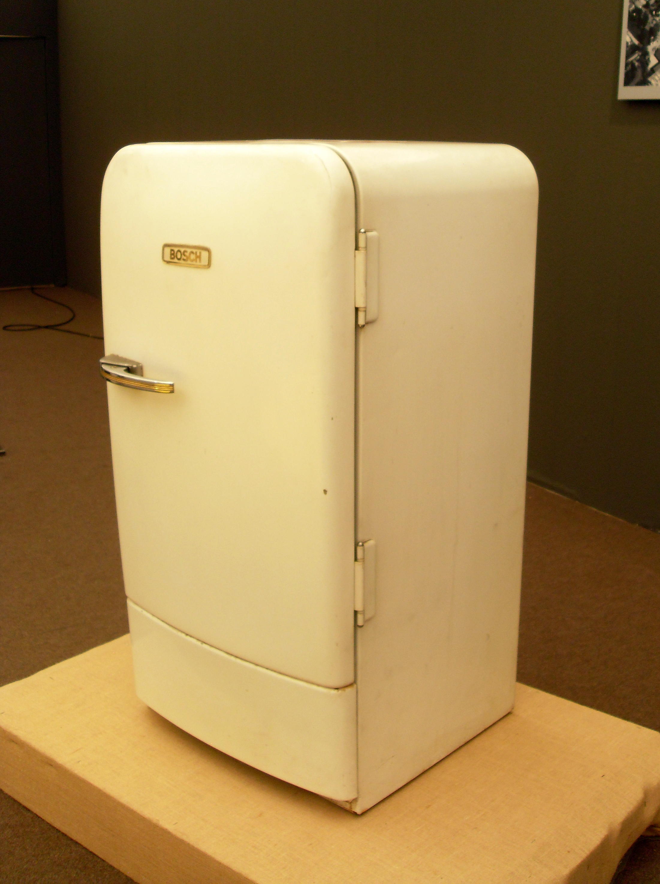 Lodówka Bosch z 1955 roku